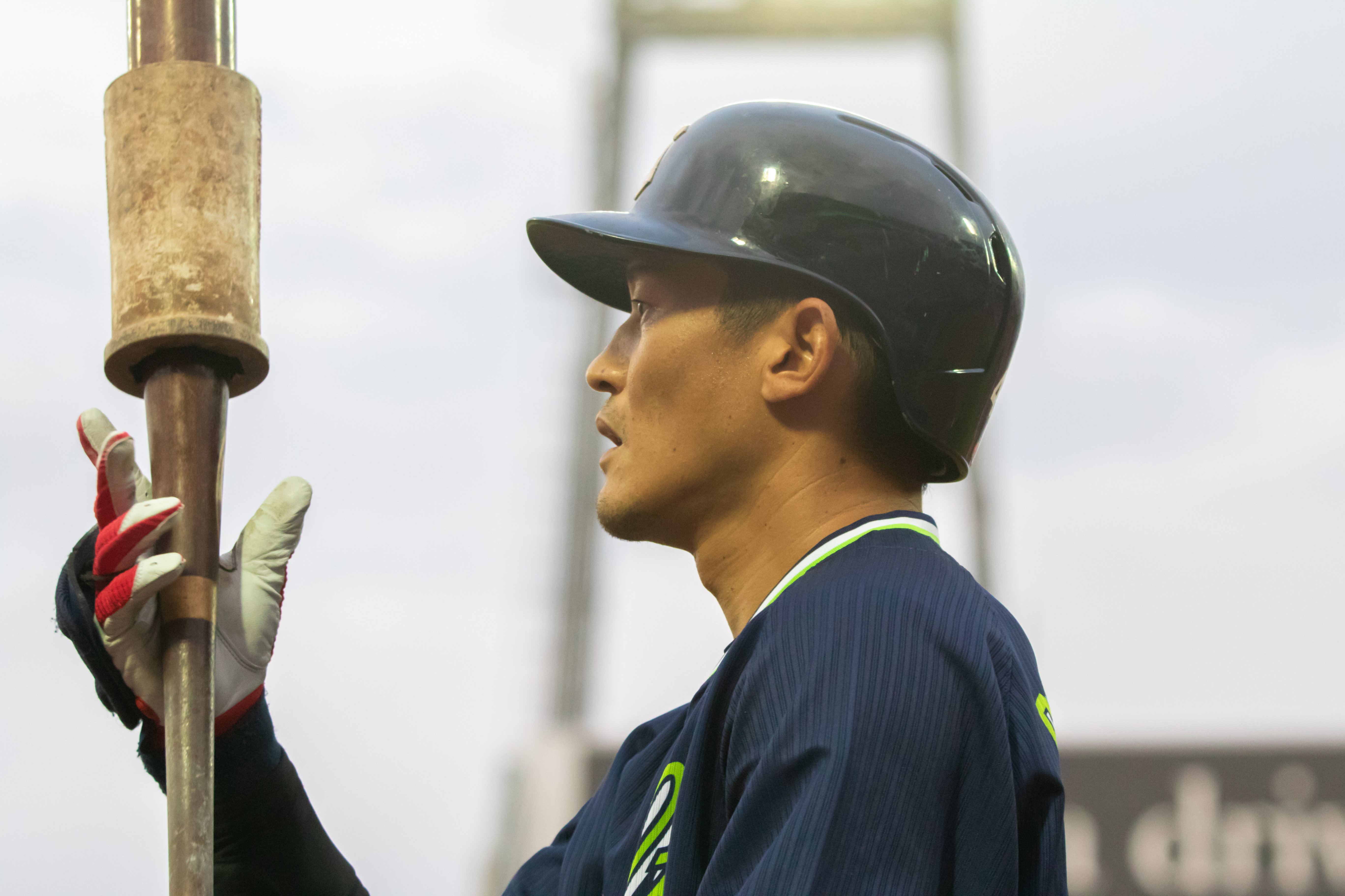 2018/7/4 マツダスタジアム